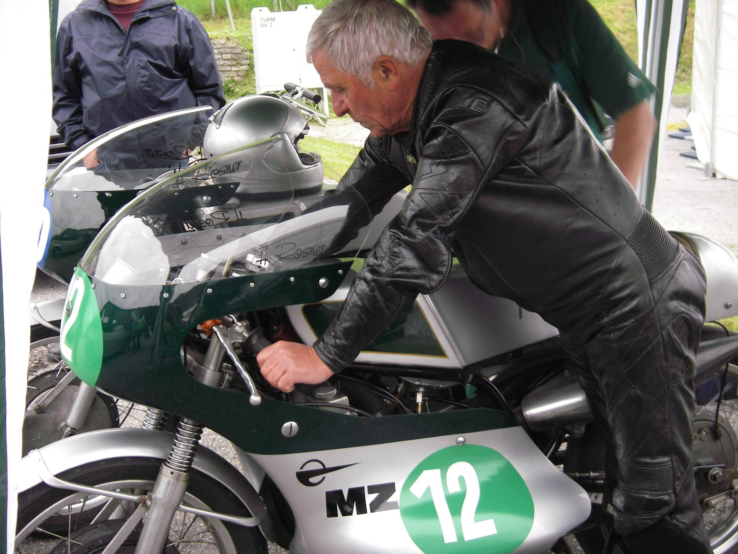 Heinz Rosner am Salzburgring 2010